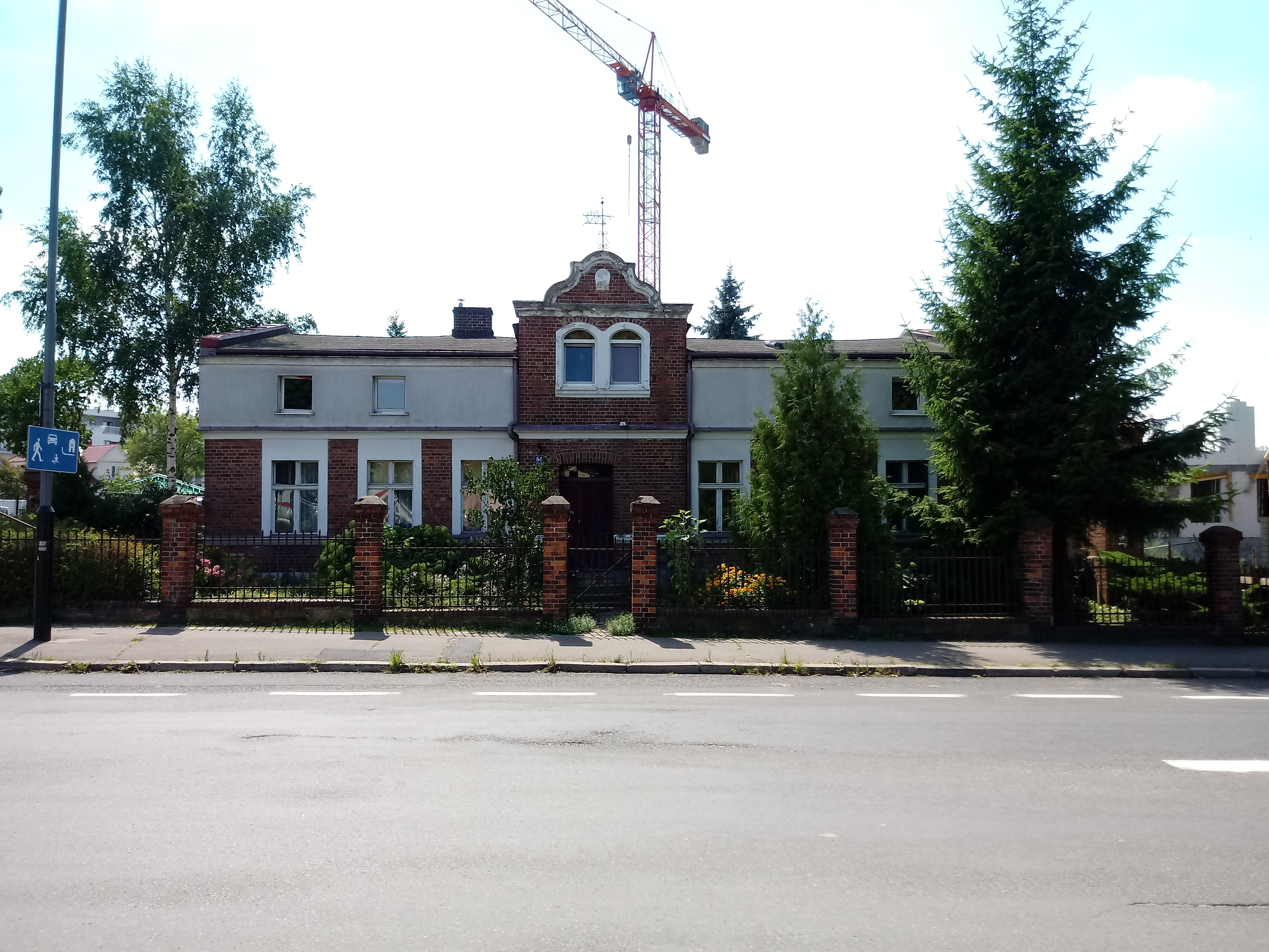 Dom Piechowiaków w Poznaniu, ul. Rzeczańska róg ul. Piłsudskiego